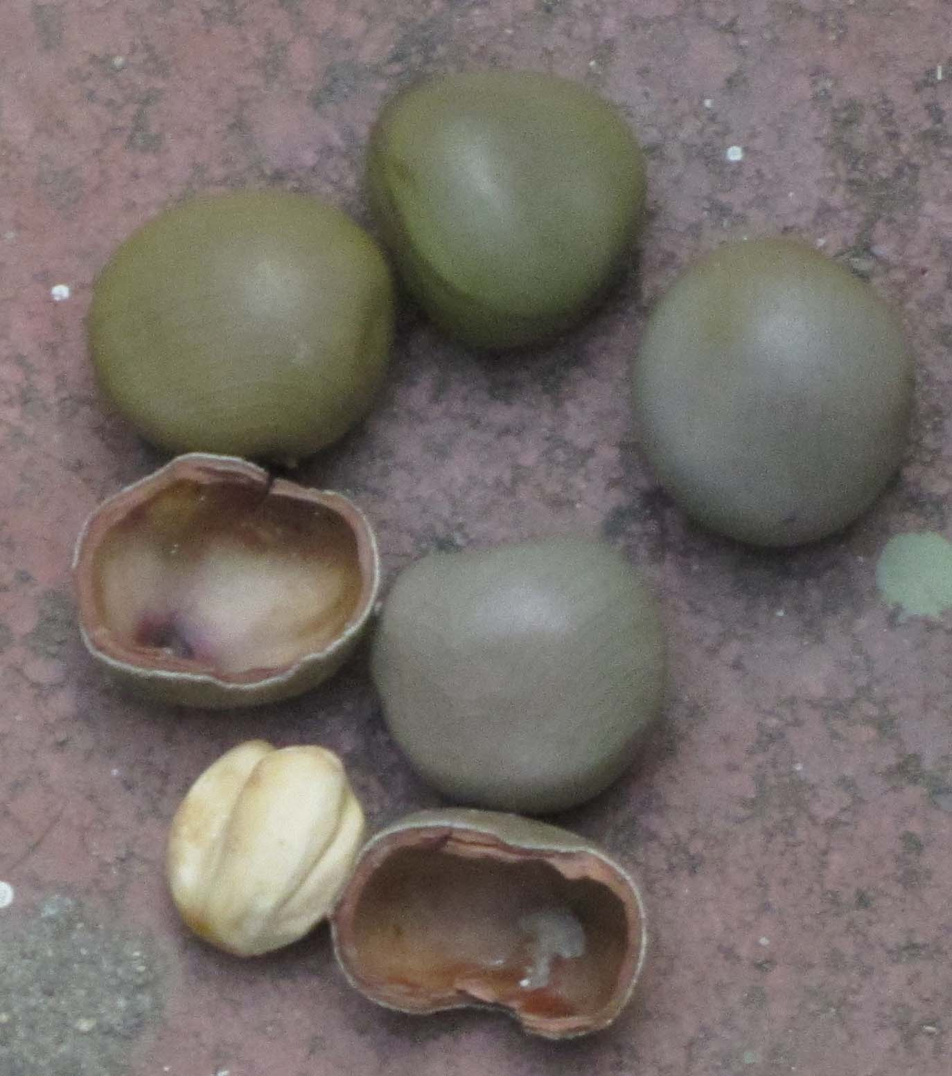 கழிச்சிக்கொட்டை என்று கூறப்படும் இதனைத் தெல்லுக்காய் என்றும், சூட்டுக்கொட்டை என்றும் வழங்குவர். சிறுவர் இதனைக் கோலிக்குண்டு போல் பயன்படுத்தி விளையாடுவர்.